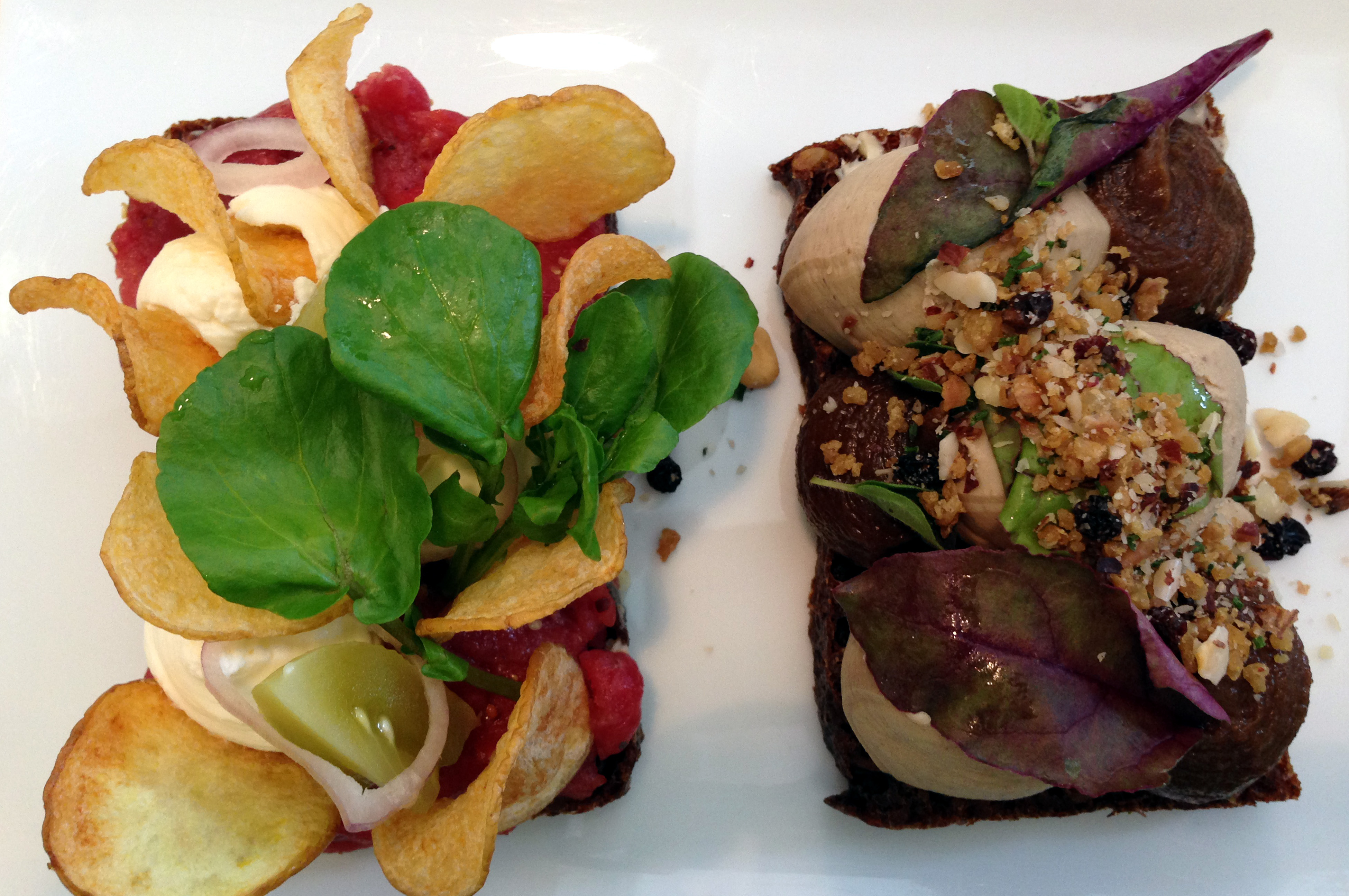 Smørrebrød med tartar og kyllingelevermousse